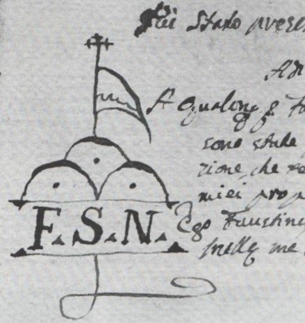 Stemma del notaio Faustino Salvi 1762 (riproduzione di un originale conservato c/o l'archivio parrocchiale di Castel Mella)